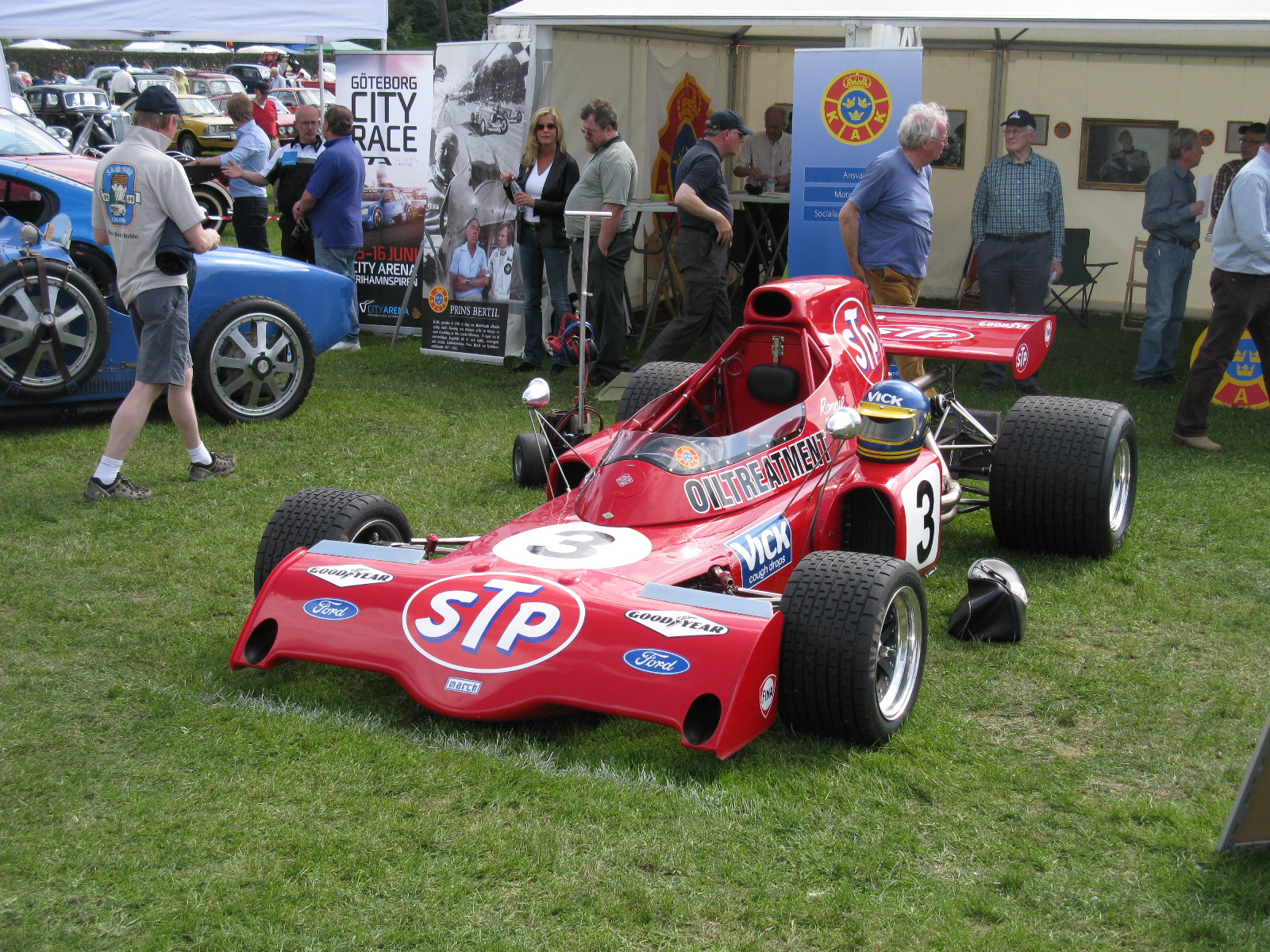 March 721X F! 1972 Ex. Ronnie Peterson